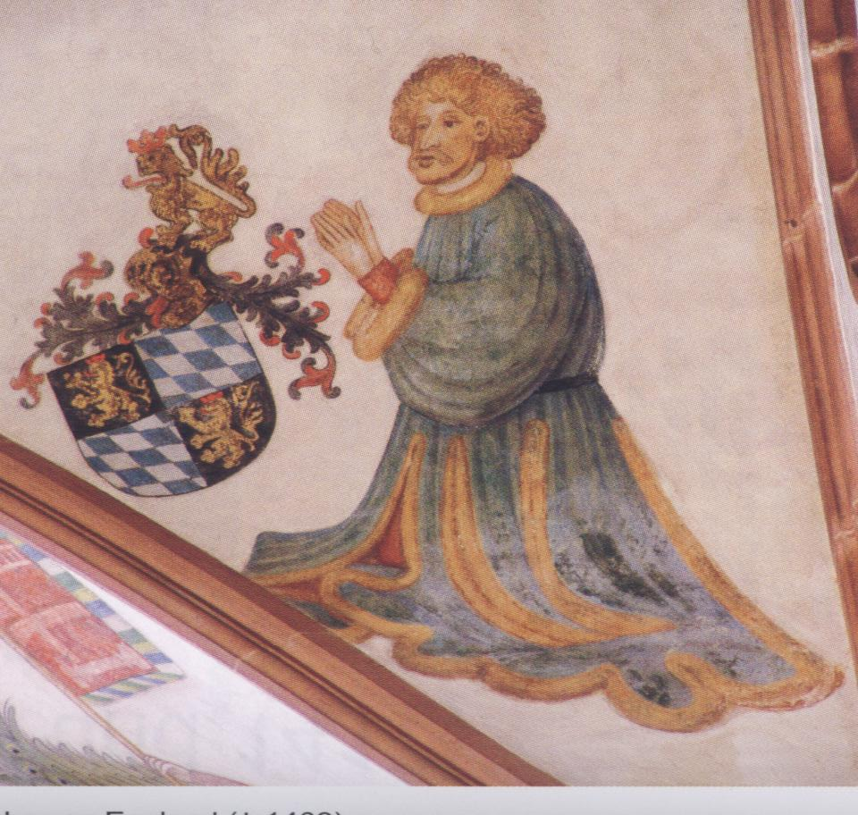 Kurfürst Ludwig III. von der Pfalz, Gemälde im Chor der Stiftskirche Neustadt an der Weinstrasse